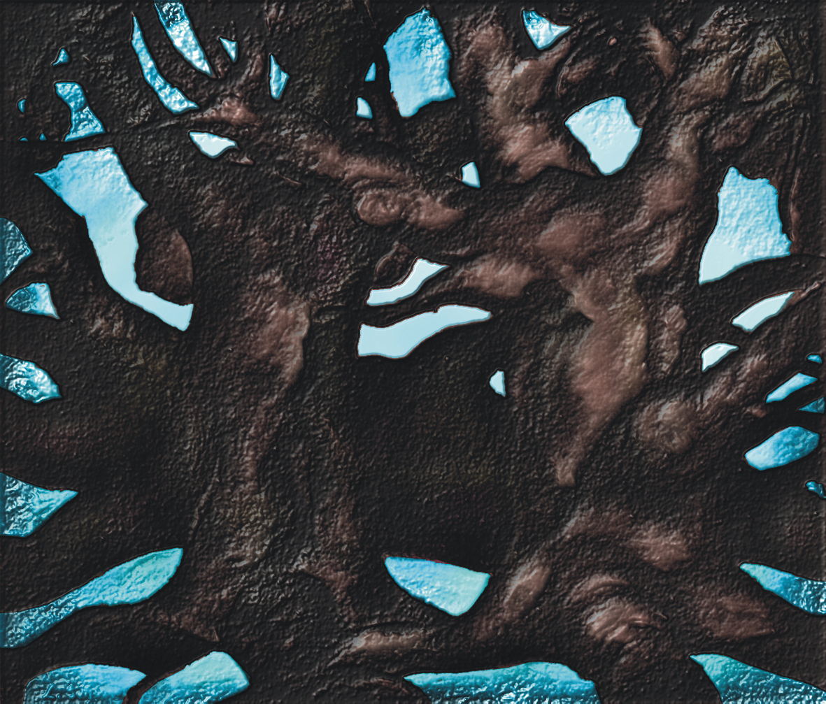 копия репродукции работы Льва Шульца "Три дерева"